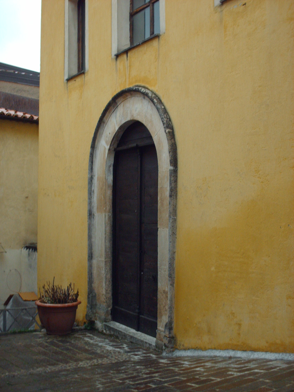 Chiesa Spirito Santo 2